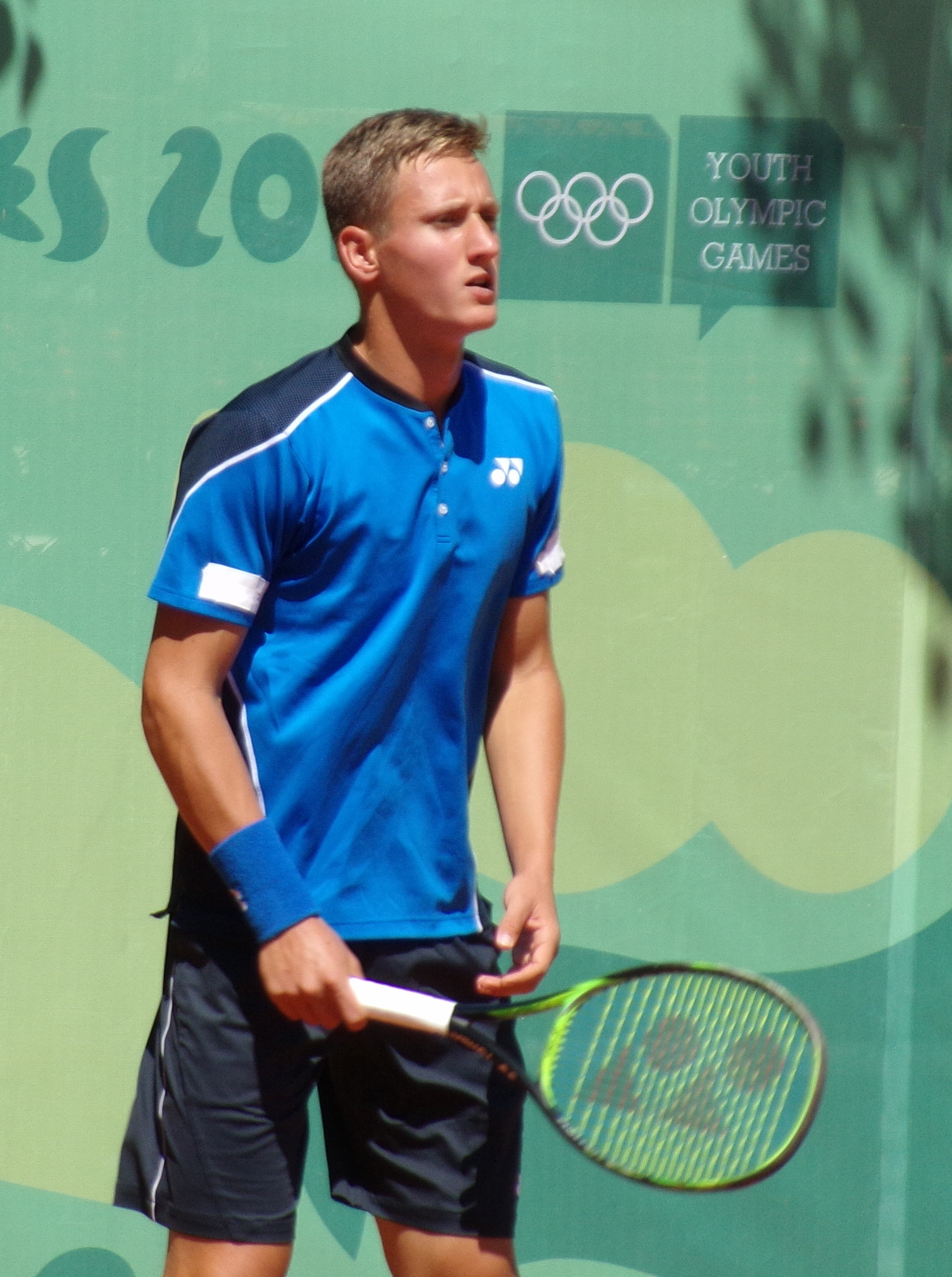 Tenis - partido Colombia-Chequia